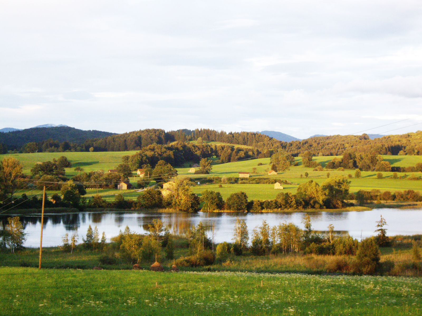 Froschhauser See, Blick nach Osten. Juli 2011. Foto: F. Welter-Schultes